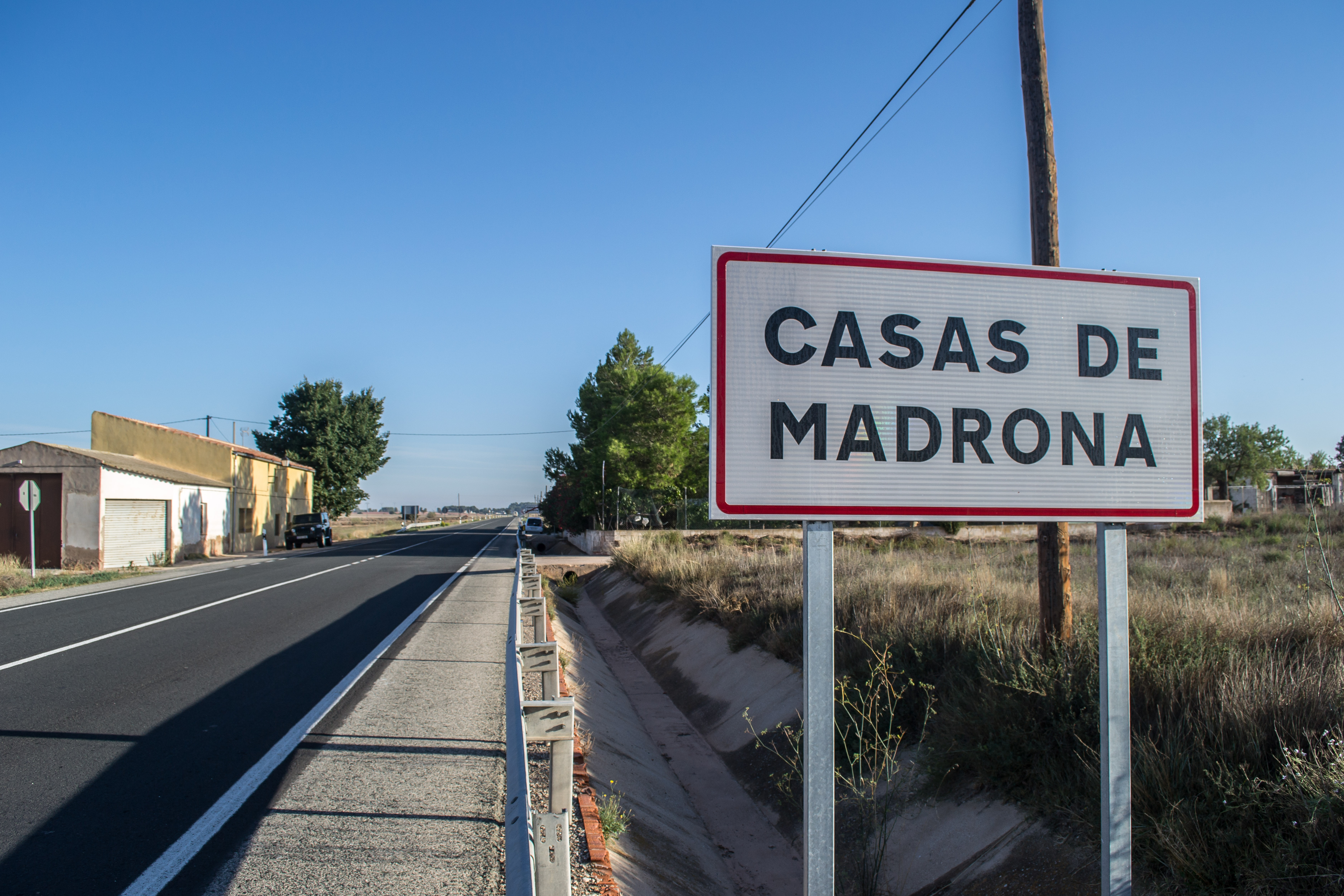 Casas de Madrona, pedanía de Ayora.